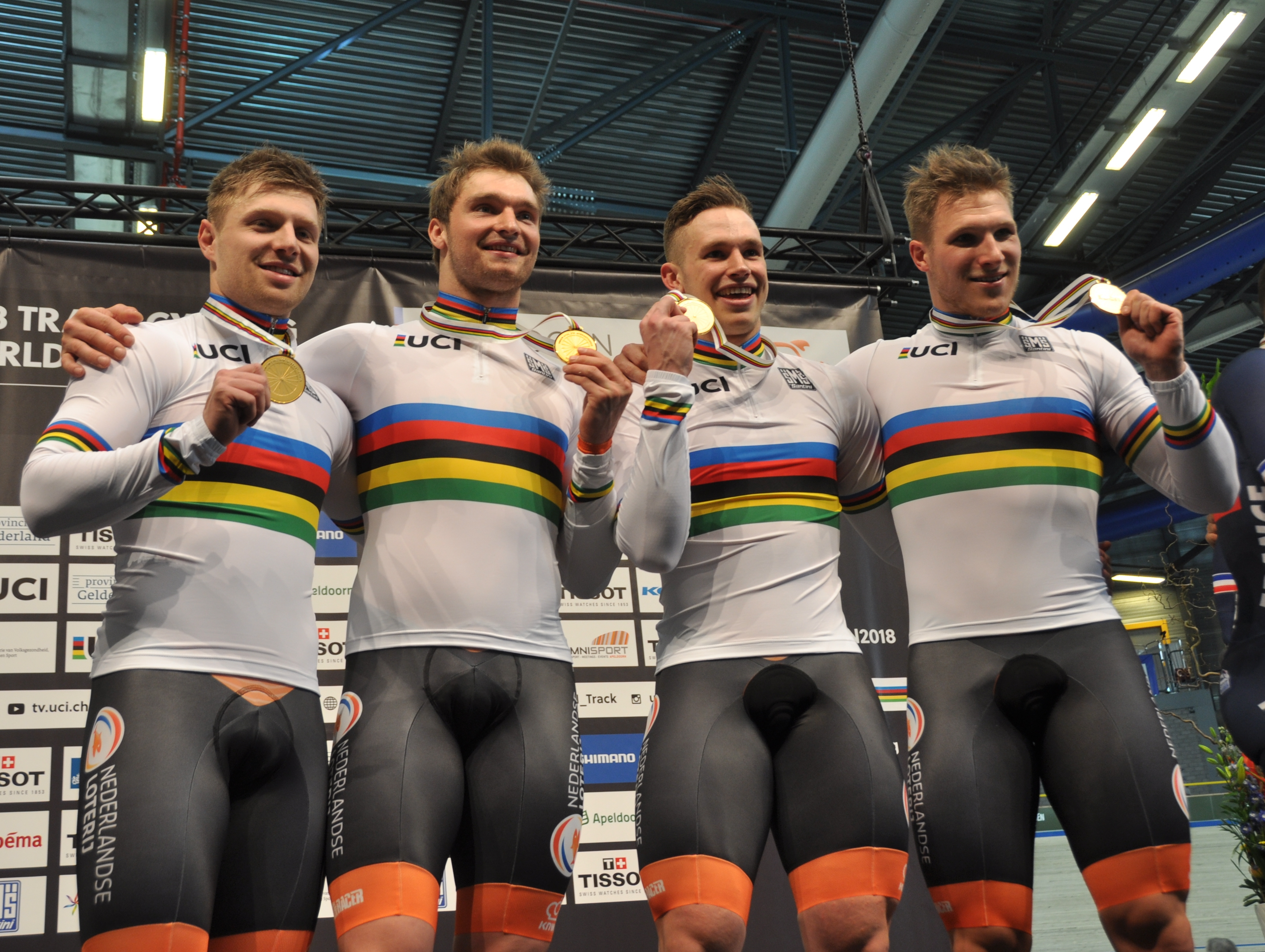 Weltmeister im Teamsprint, Mannschaft der Niederlande (v.l.n.r.): Nils van 't Hoenderdaal, Matthijs Büchli, Harrie Lavreysen, Jeffrey Hoogland